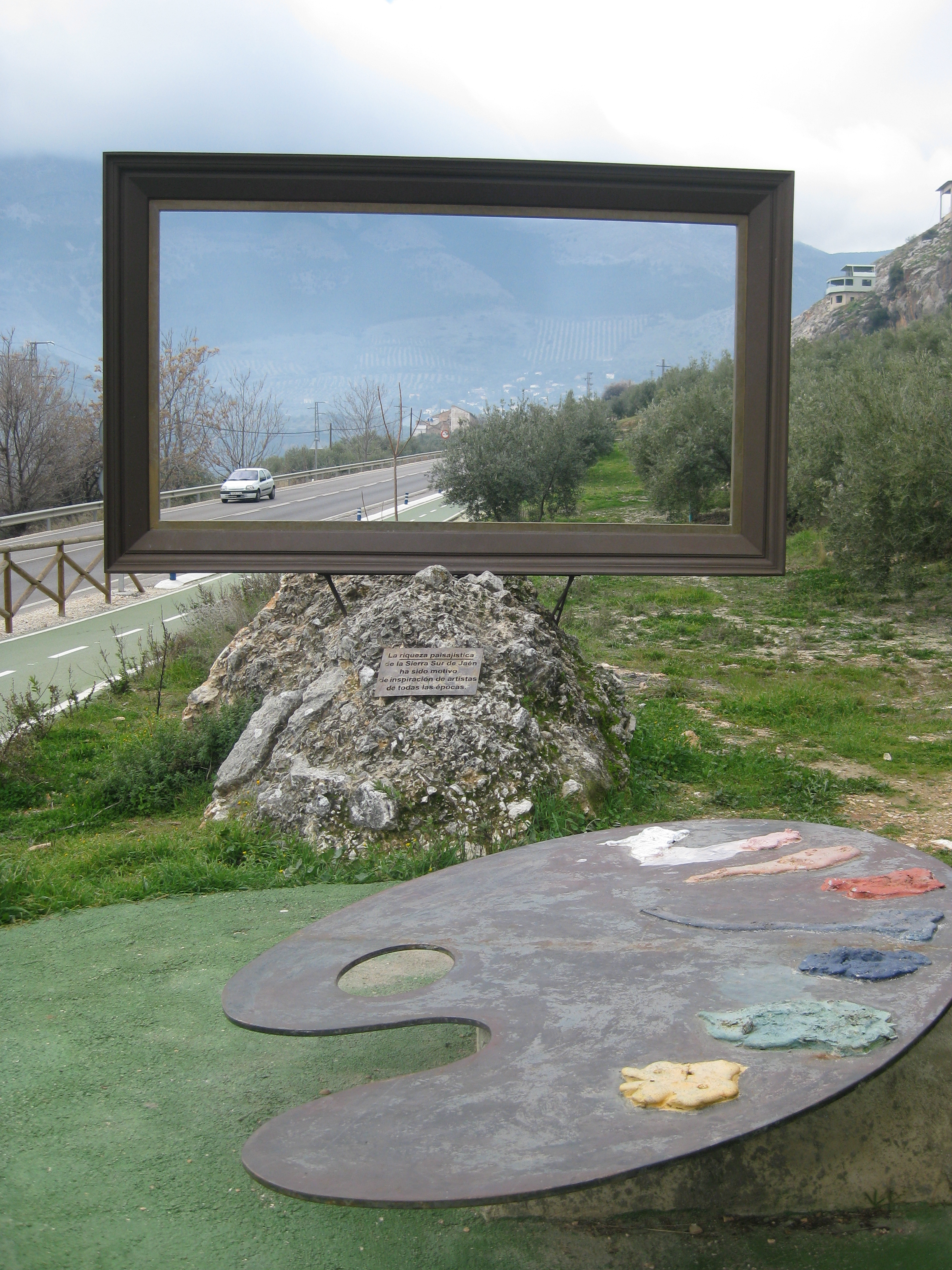 Paisaje para pintores